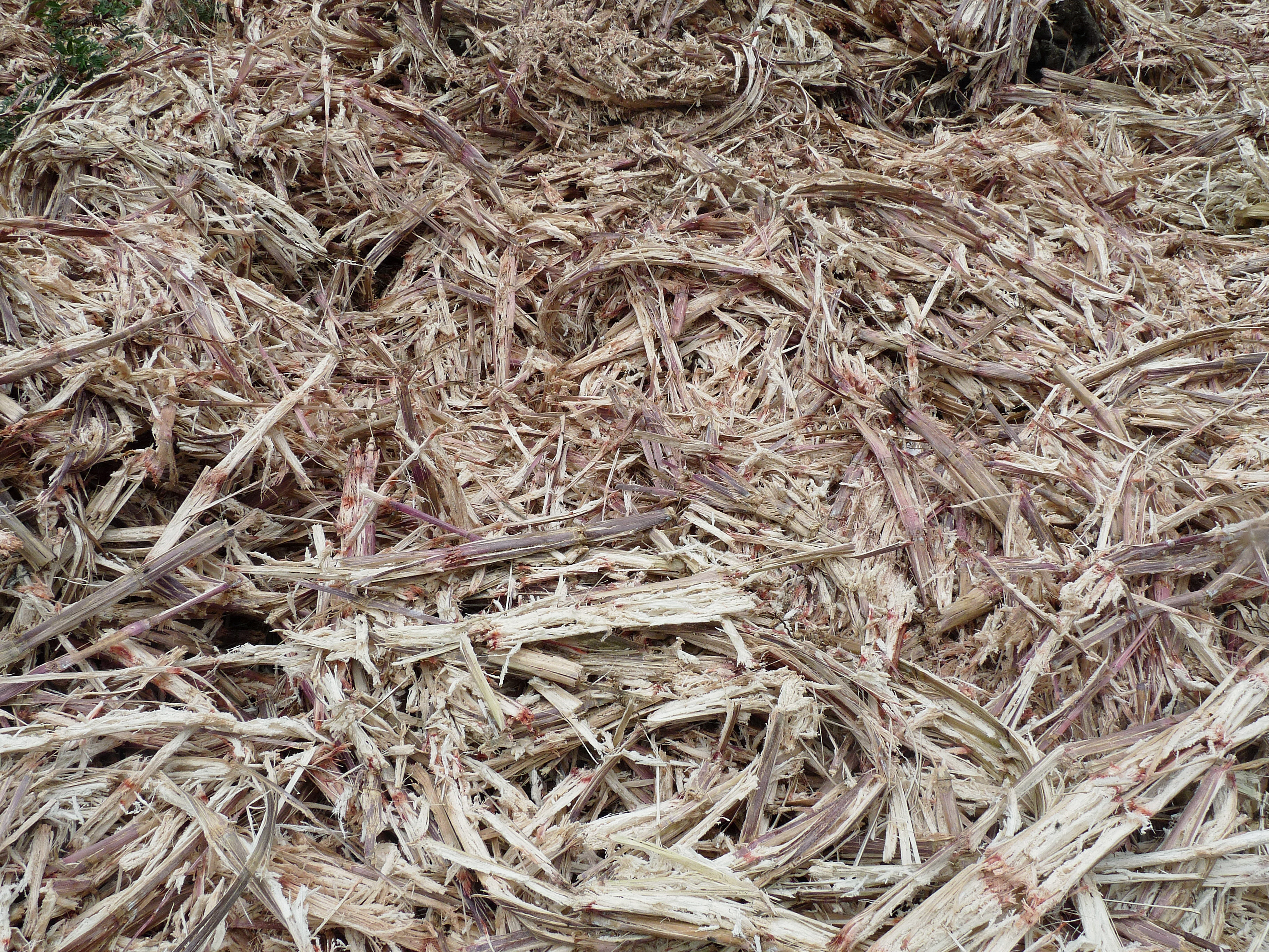 Ribeira Principal (île de Santiago, Cap-Vert) : canne à sucre déchiquetée dans une distillerie